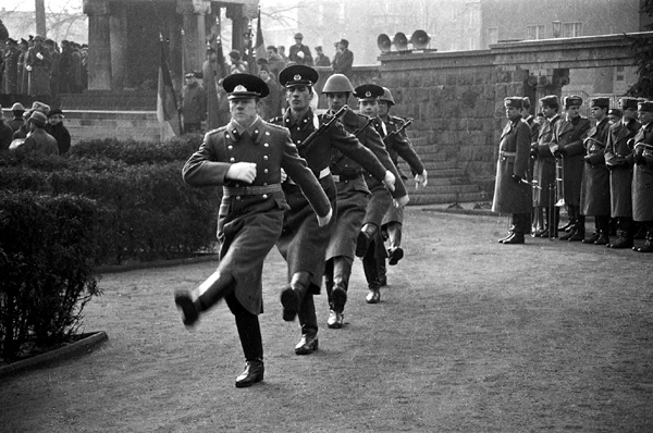 Tag der Sowjetarmee, Brandenburg 1985